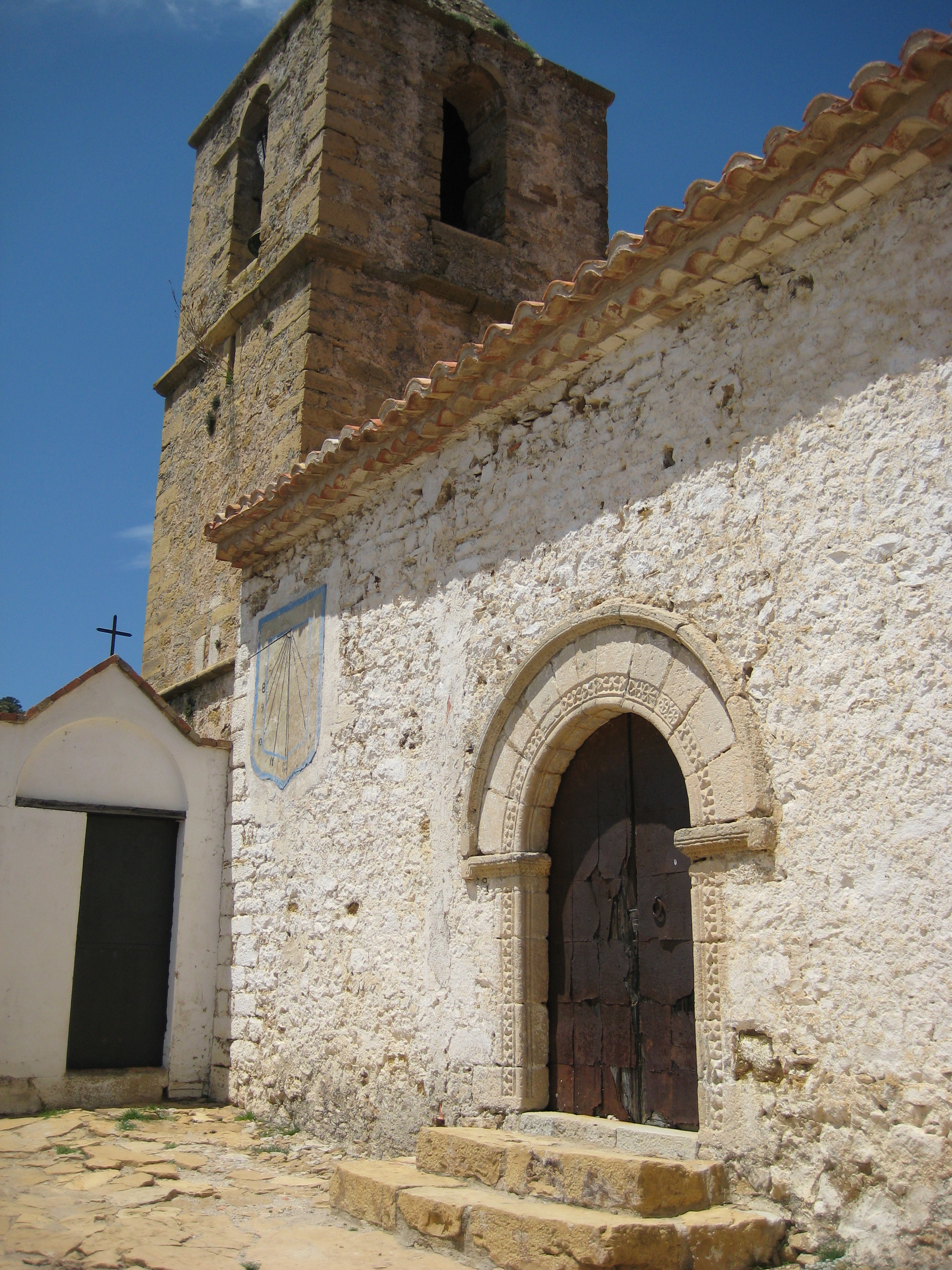 Església de Sant Jaume de Bel (Rosell, Baix Maestrat)